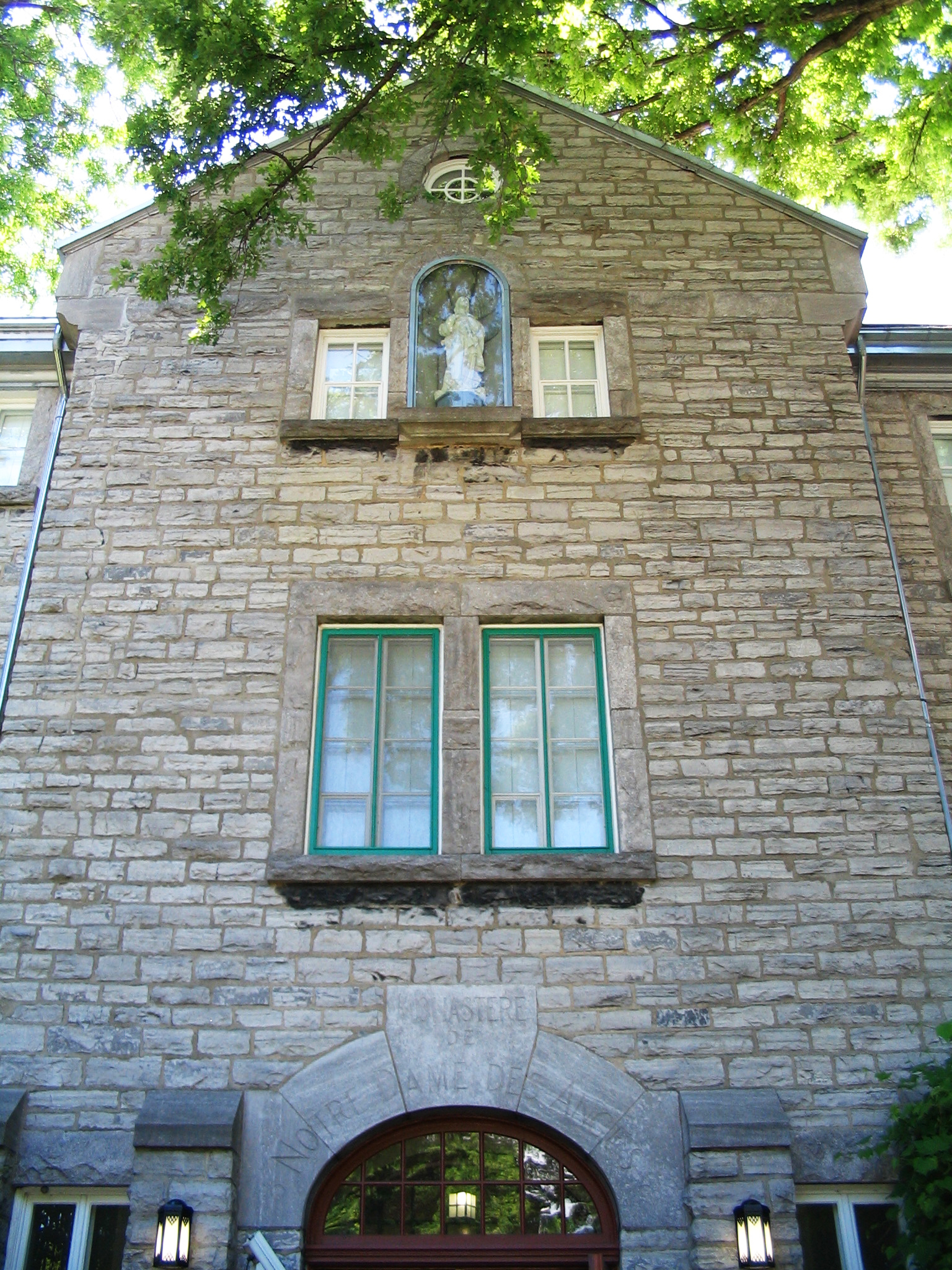 Facade du monastère de Notre-Dame-des-Anges.jpg.